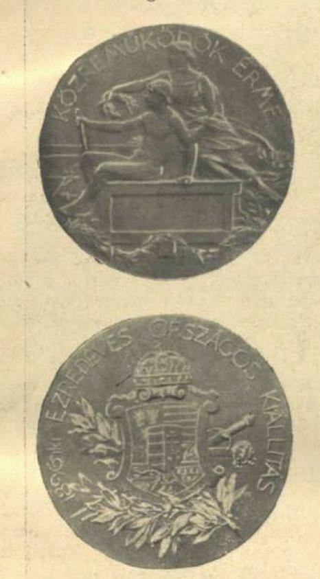 1896-os millennium közreműködőinek érme